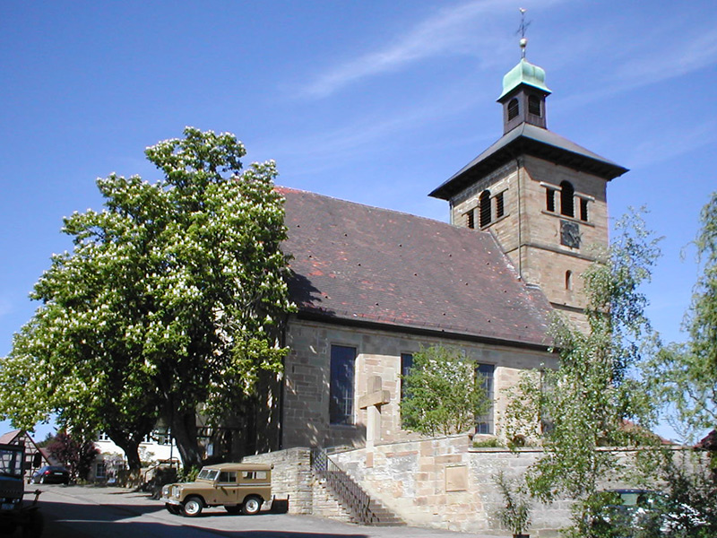 Pfarrkirche St. Lukas in Ebrstadt (Württemberg)